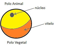 Zigoto com identificação dos polos